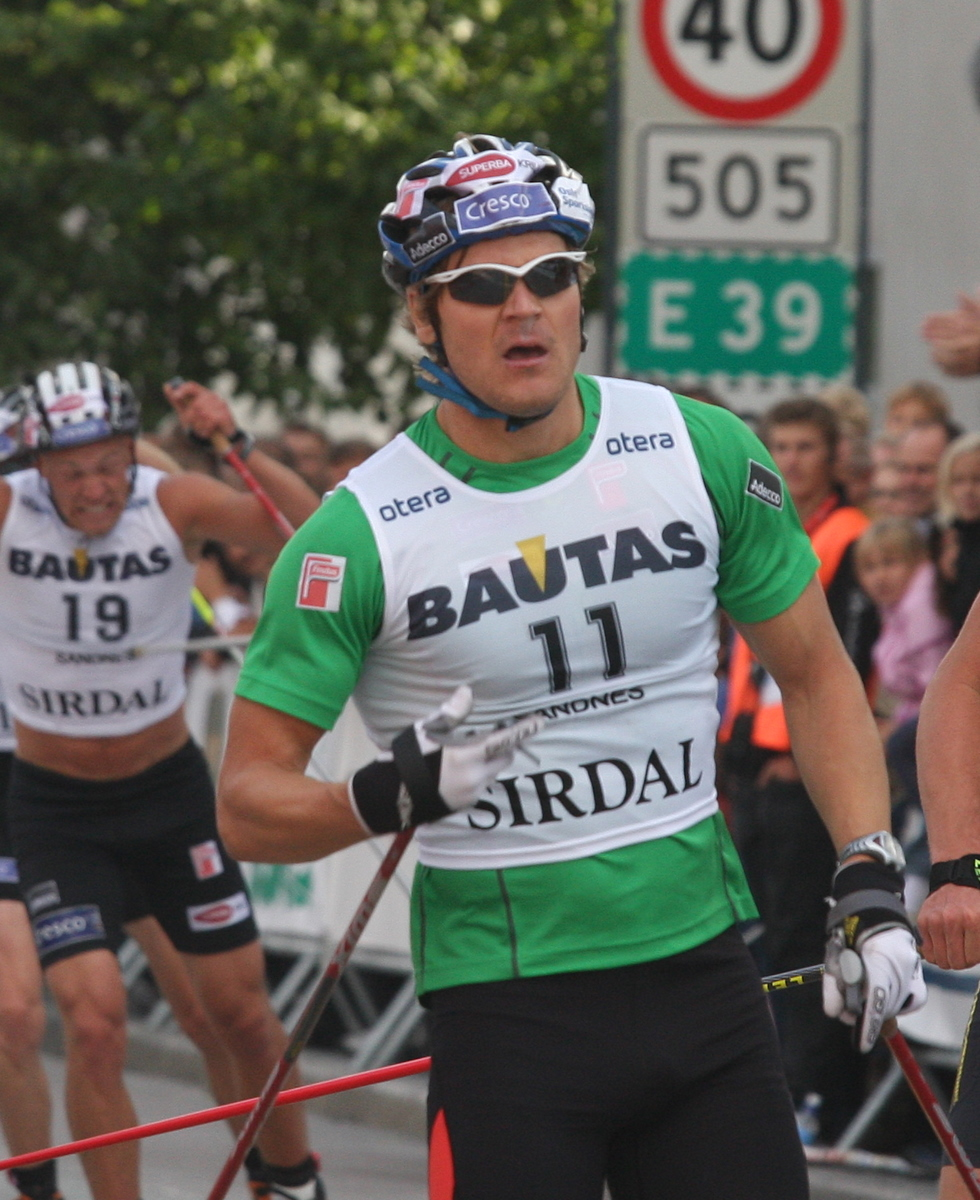 Øystein Pettersen under Blinkfestivalen i Sandnes 2009